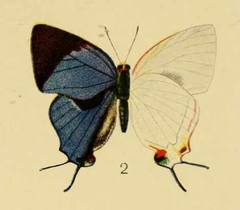 Iolaus scintillans